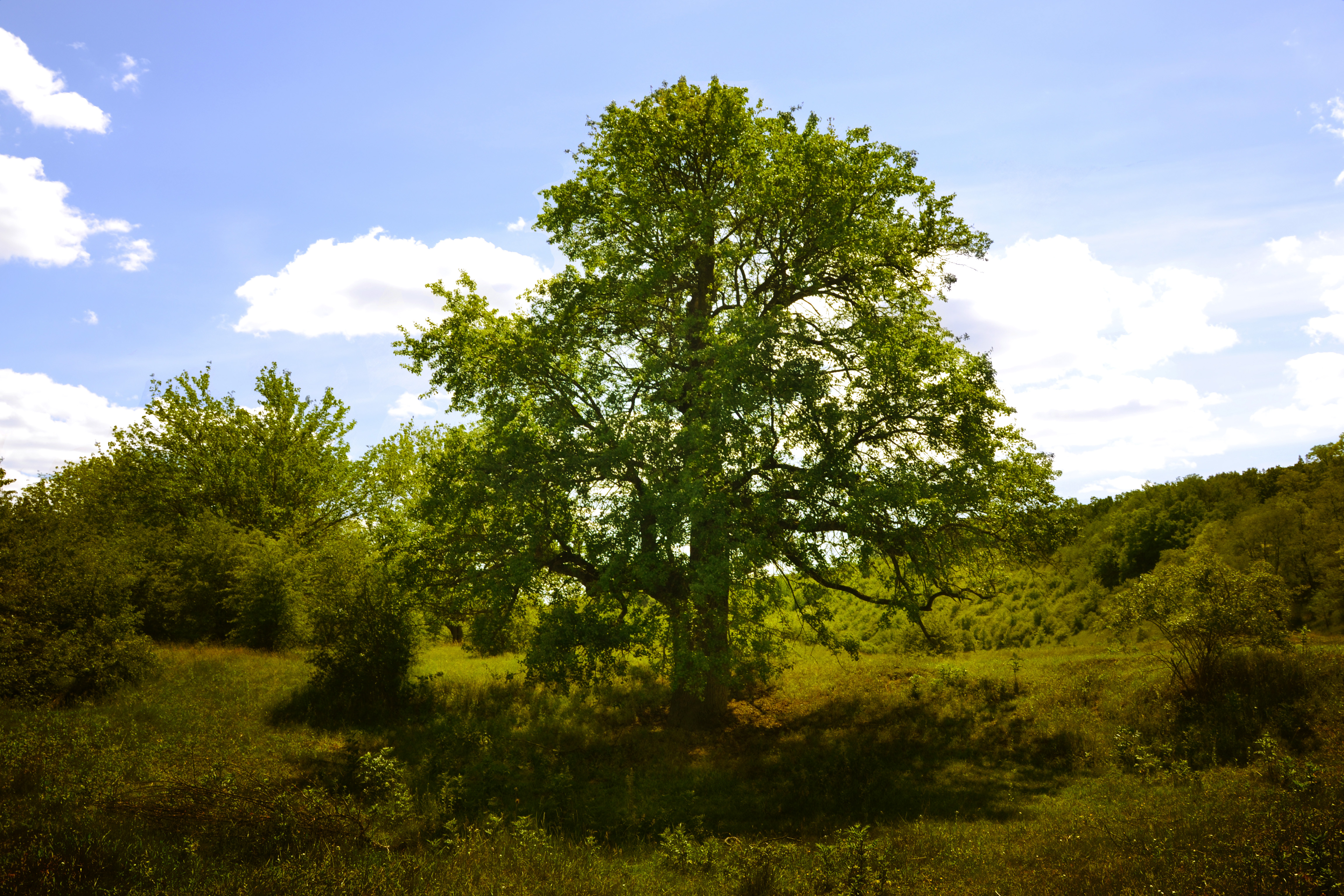 raionul Briceni, la sud de satul Pererîta